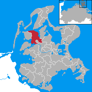 Trent, Landkreis Rügen, Mecklenburg-Vorpommern